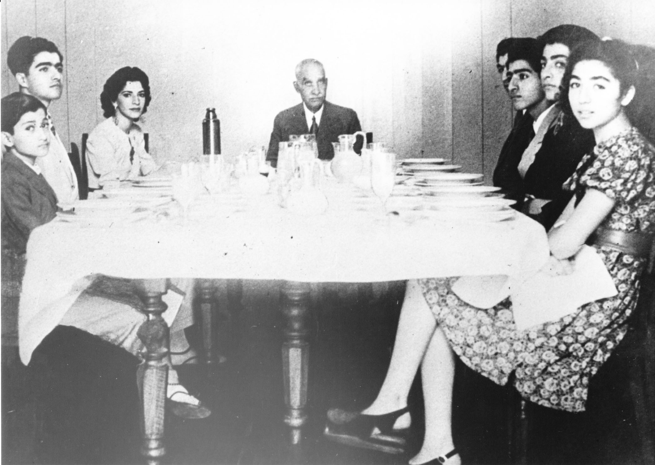 Reza Chah et ses enfants en Afrique du Sud, 1942-1944